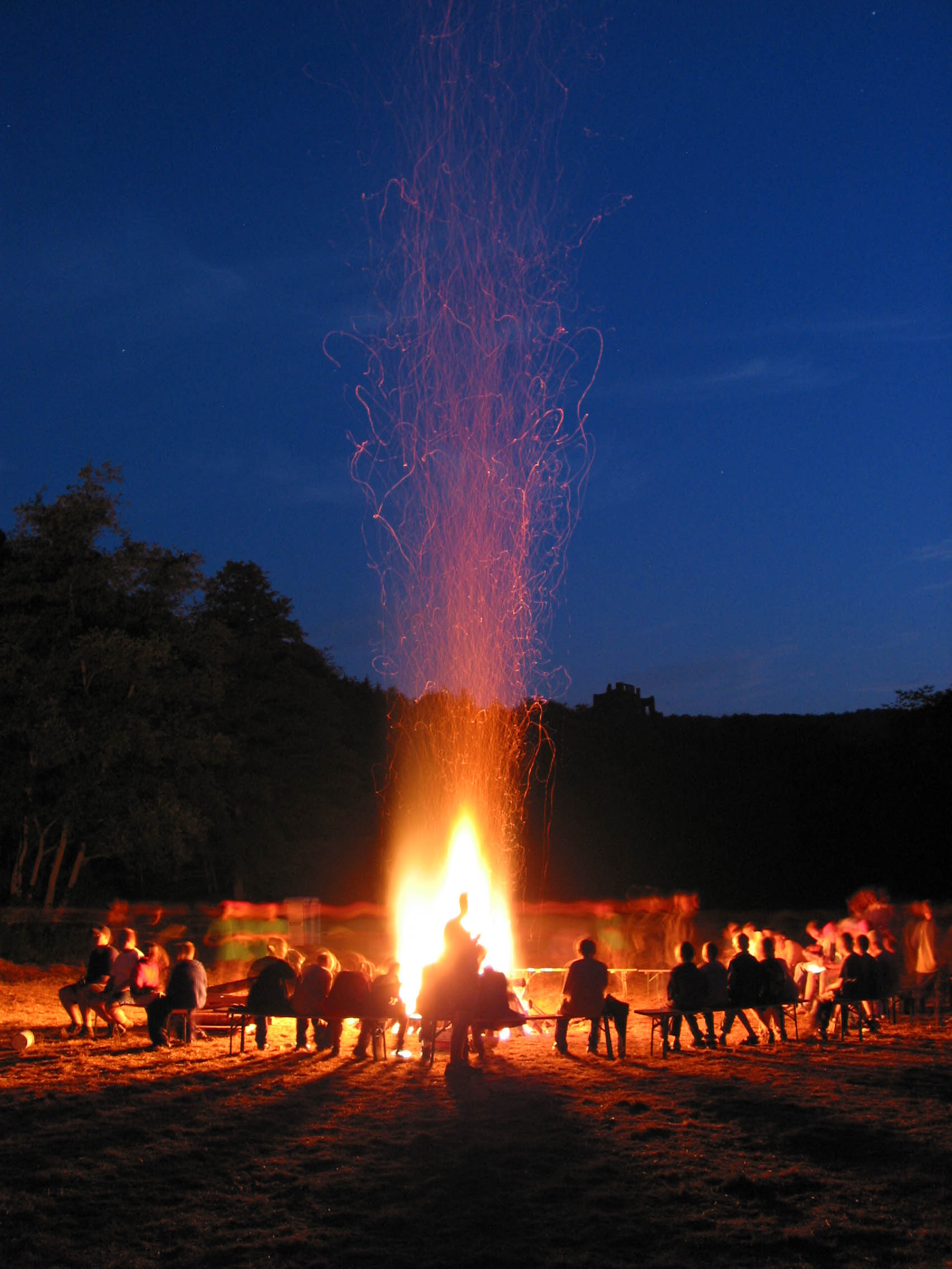 Lagerfeuer des Zeltlagers St. Georg Rüsselsheim in Bundenbach im Hunsrück am Fuße der Schmidtburg, Landkreis Birkenfeld, Rheinland-Pfalz, Deutschland.